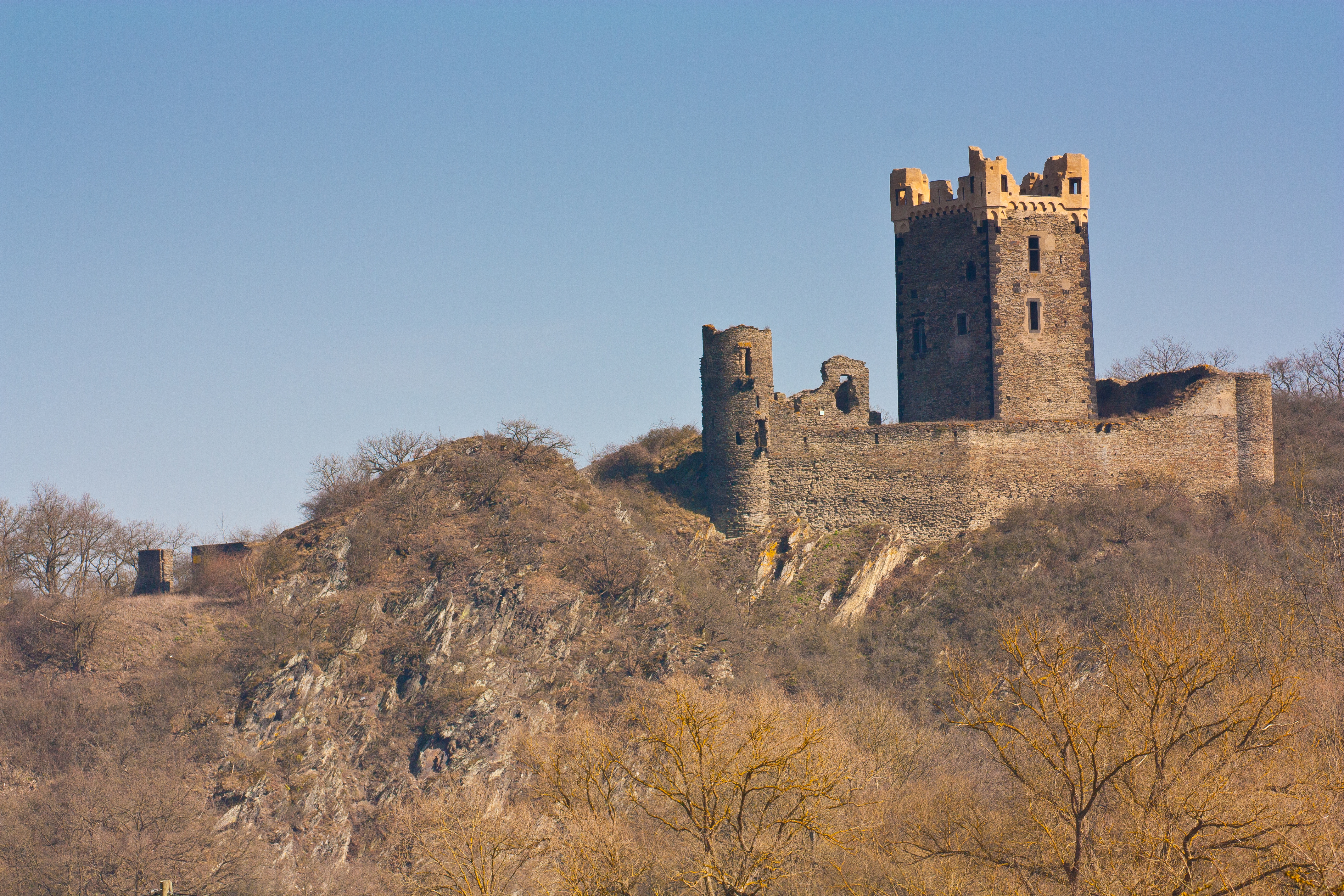 Blick auf die Ruine der Burg Wernerseck aus dem Nettetal aus Richtung Ochtendung kommend.